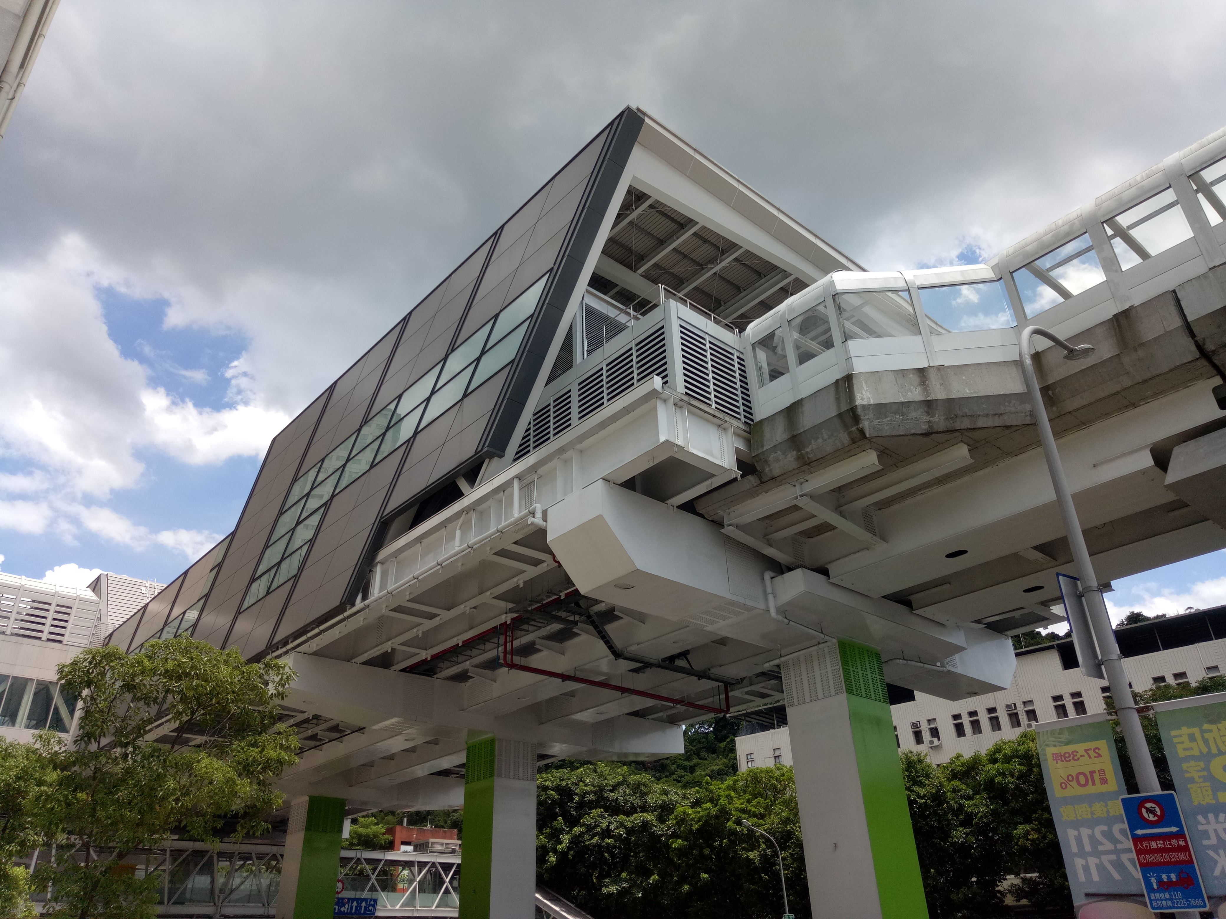 臺北捷運環狀線秀朗橋站，高架站體。